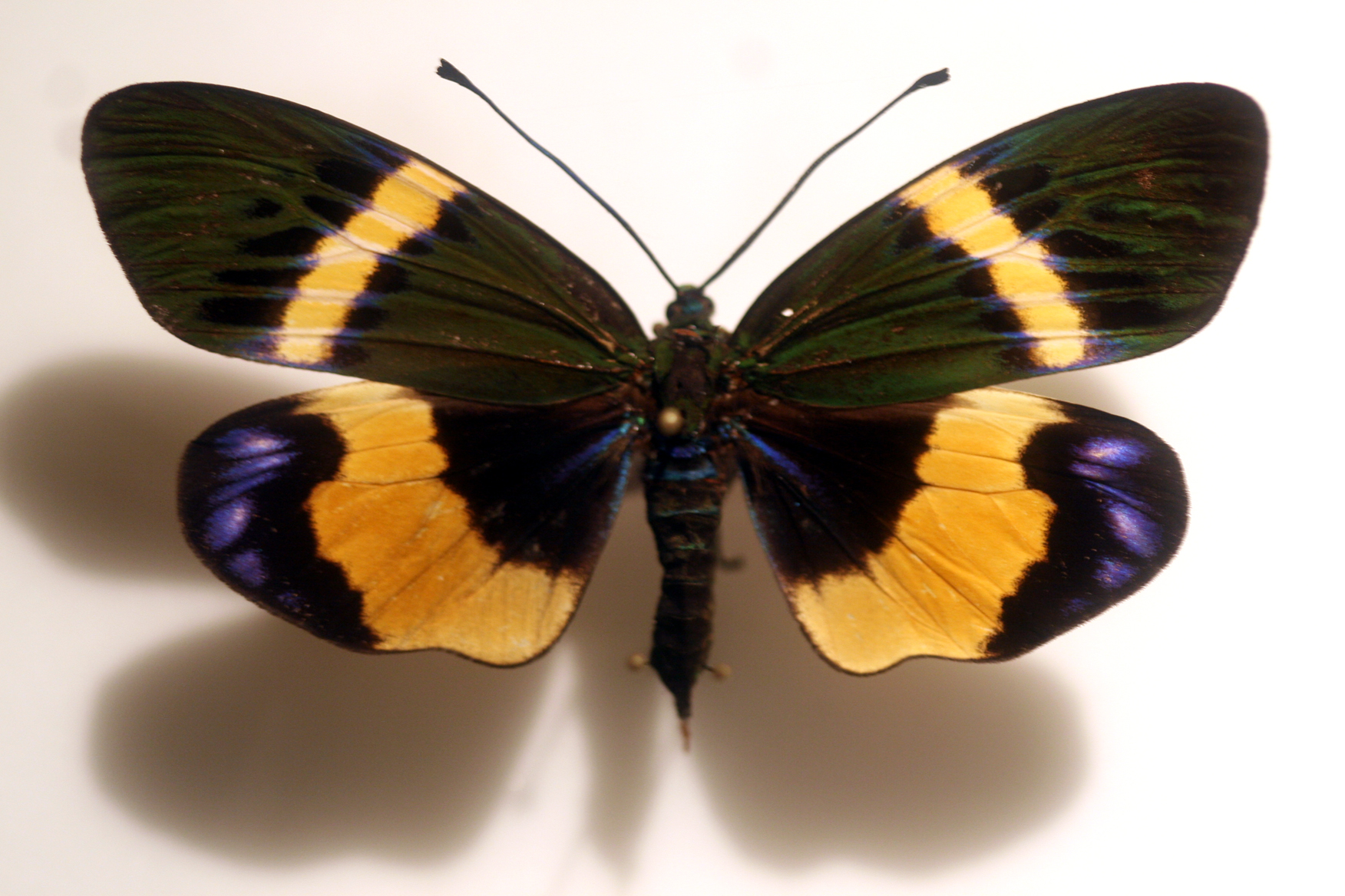 Mariposa Eterusia repleta